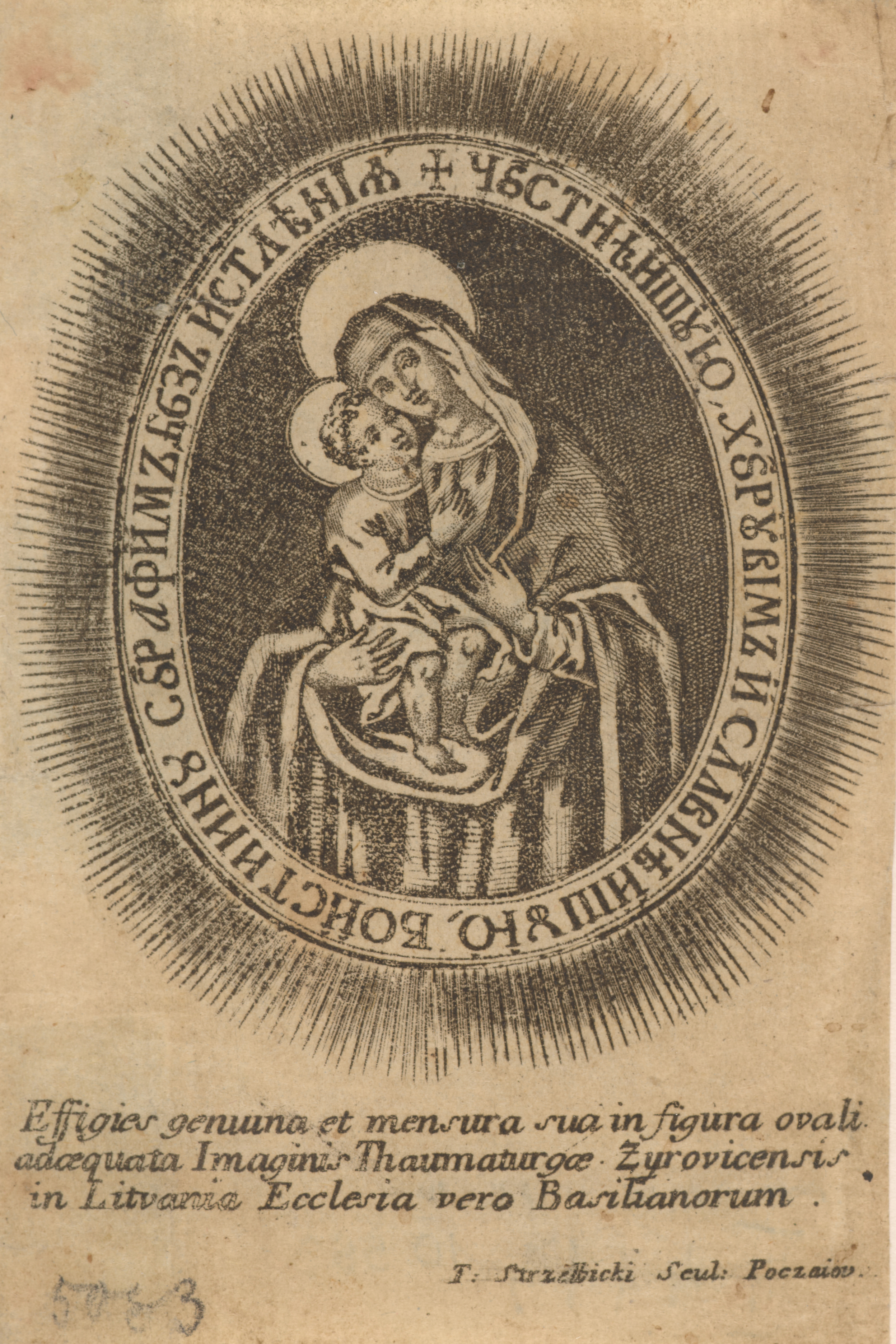 Беларуская (тарашкевіца): Абраз Маці Божай Жыровіцкай (Maci Božaja Žyrovickaja)